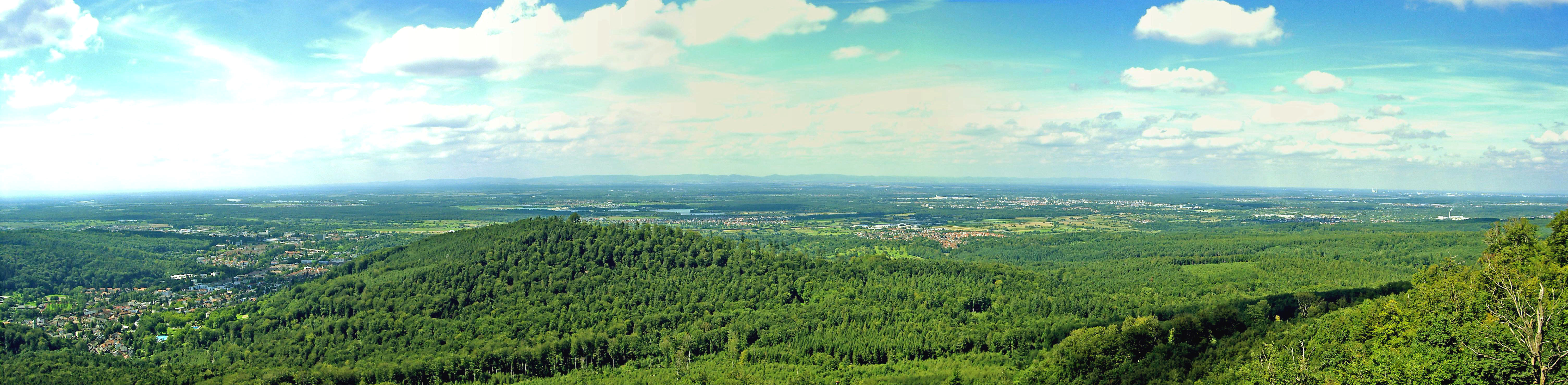 Dolina Renu z zamku HochBaden w Baden-Baden